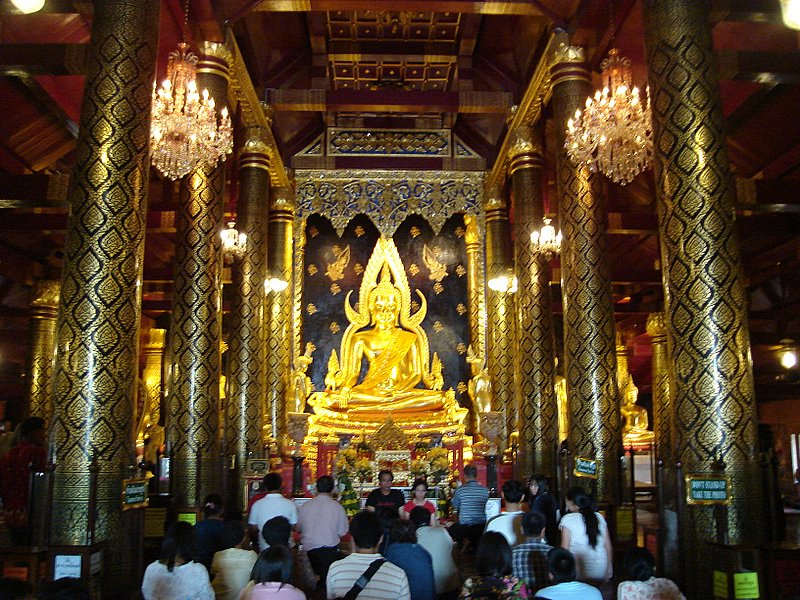 ภายในพระวิหารพระพุทธชินราช วัดพระศรีรัตนมหาธาตุวรมหาวิหาร Wat Phra Sri Ratanamahatat.Phitsanulok,Thailand.2006